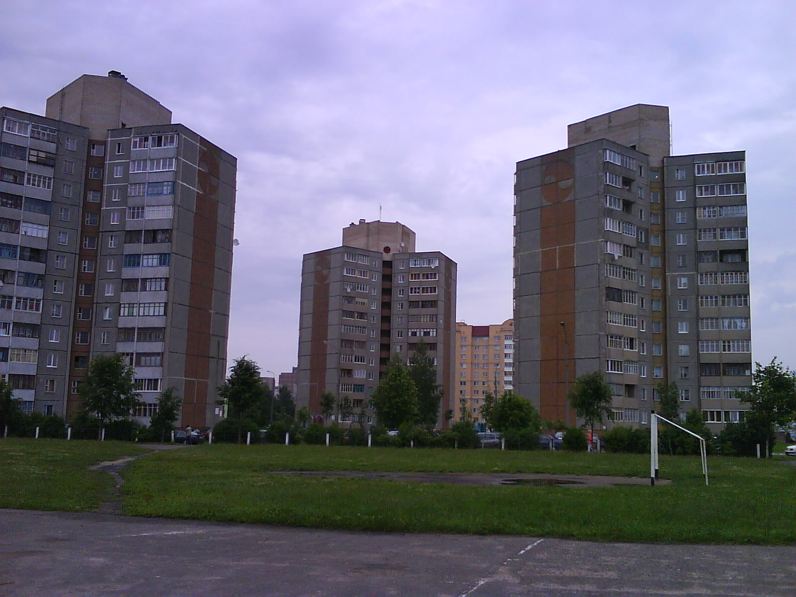 "фирменные" дома